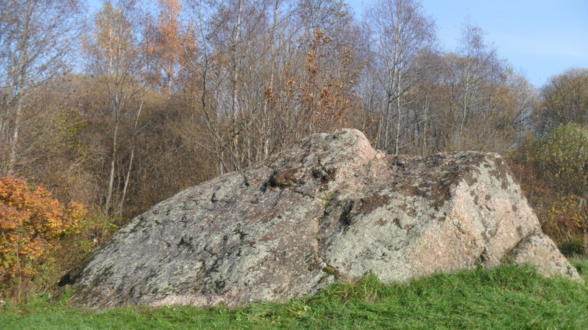 Валун